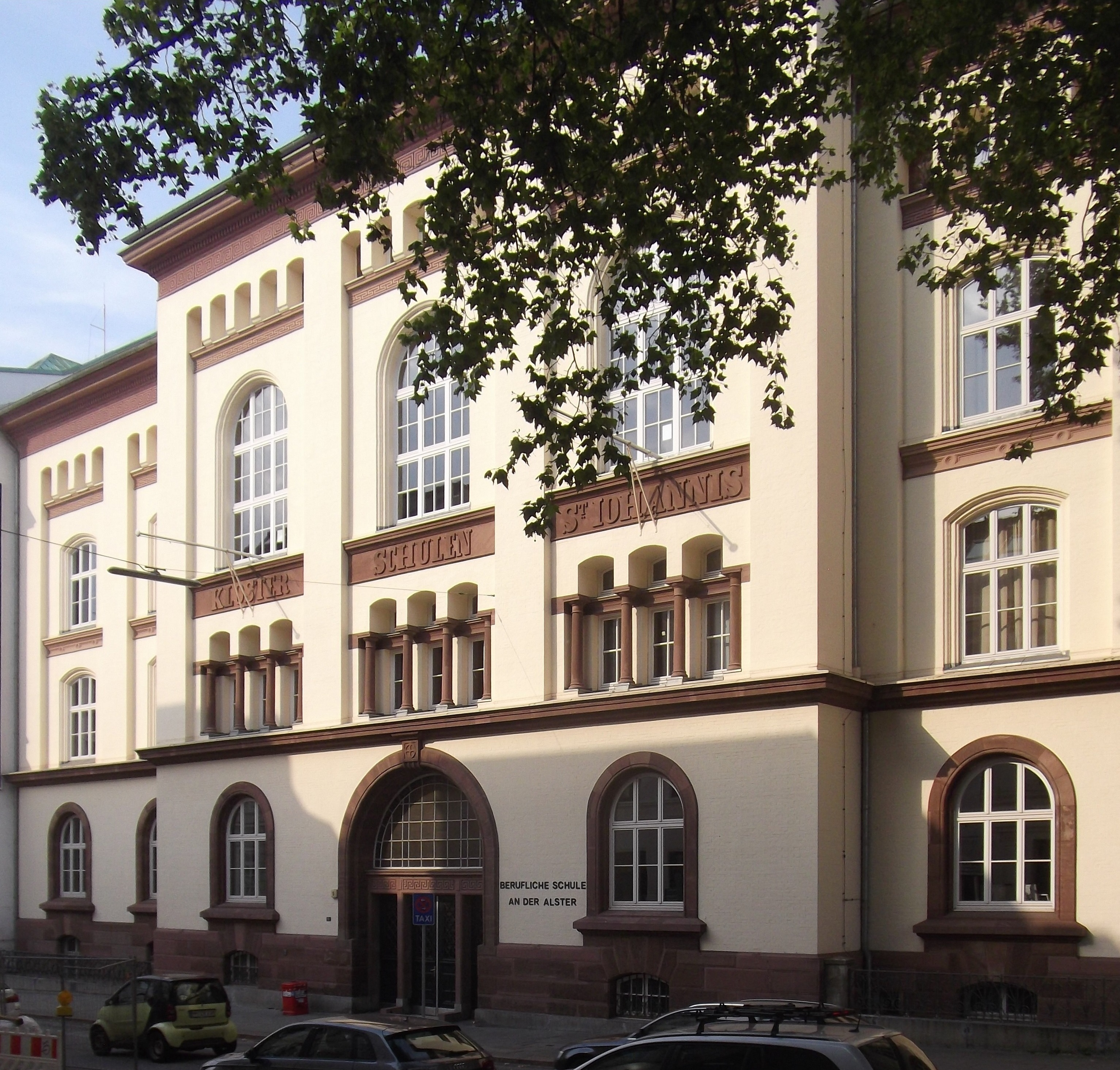 Hamburg Holzdamm